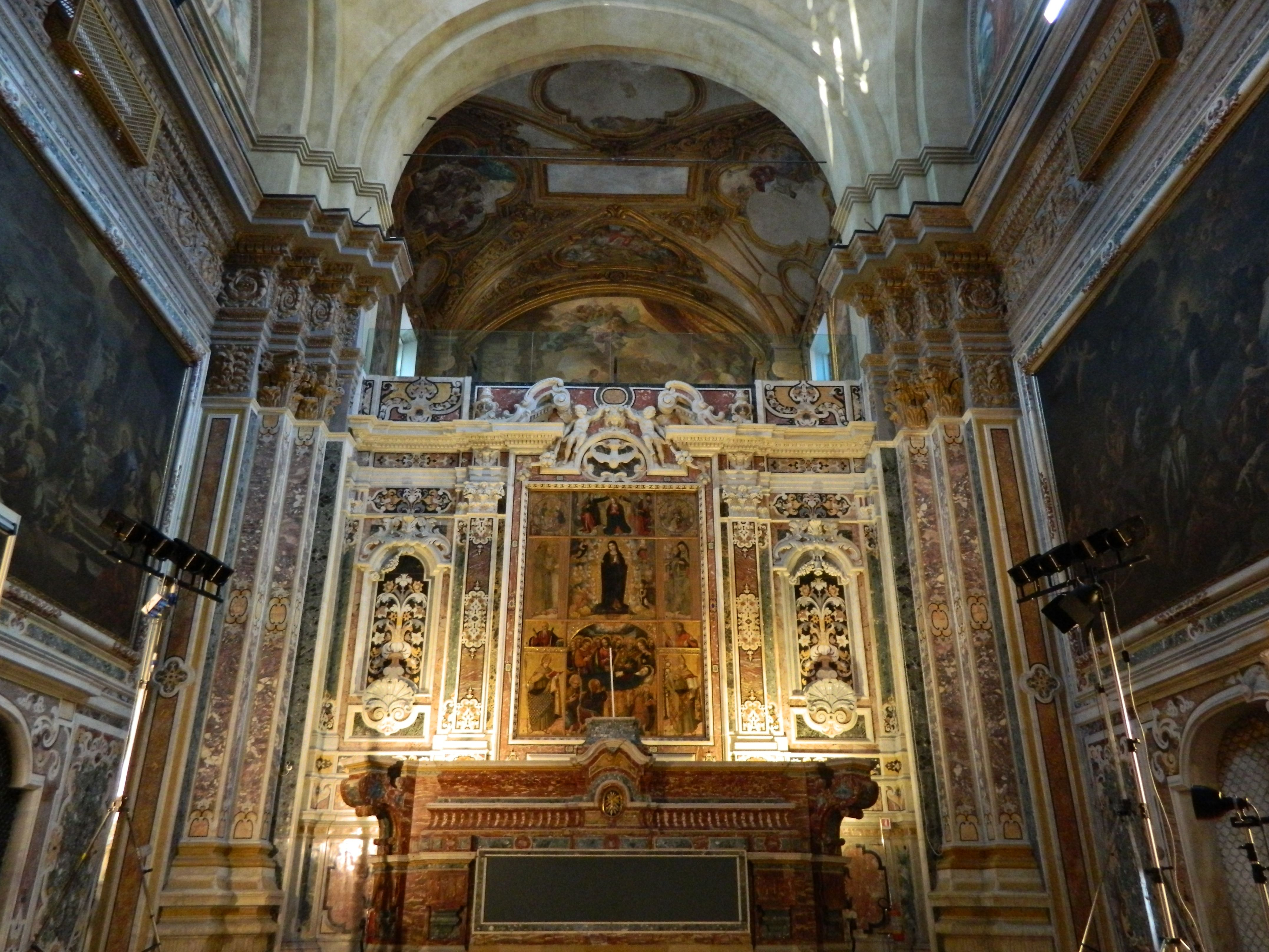 Chiesa di Santa Maria Donnaregina Nuova - Abside